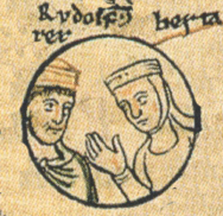 Bertha of Burgundy and Rodolph III of Burgundy